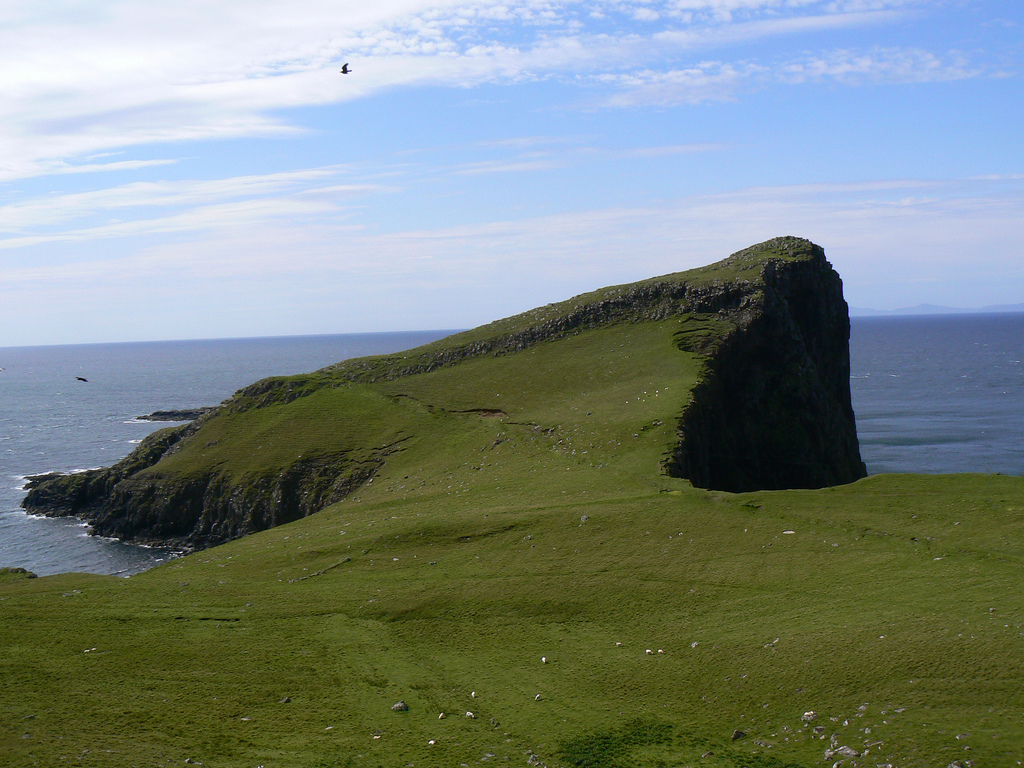 Neist Point, Skye